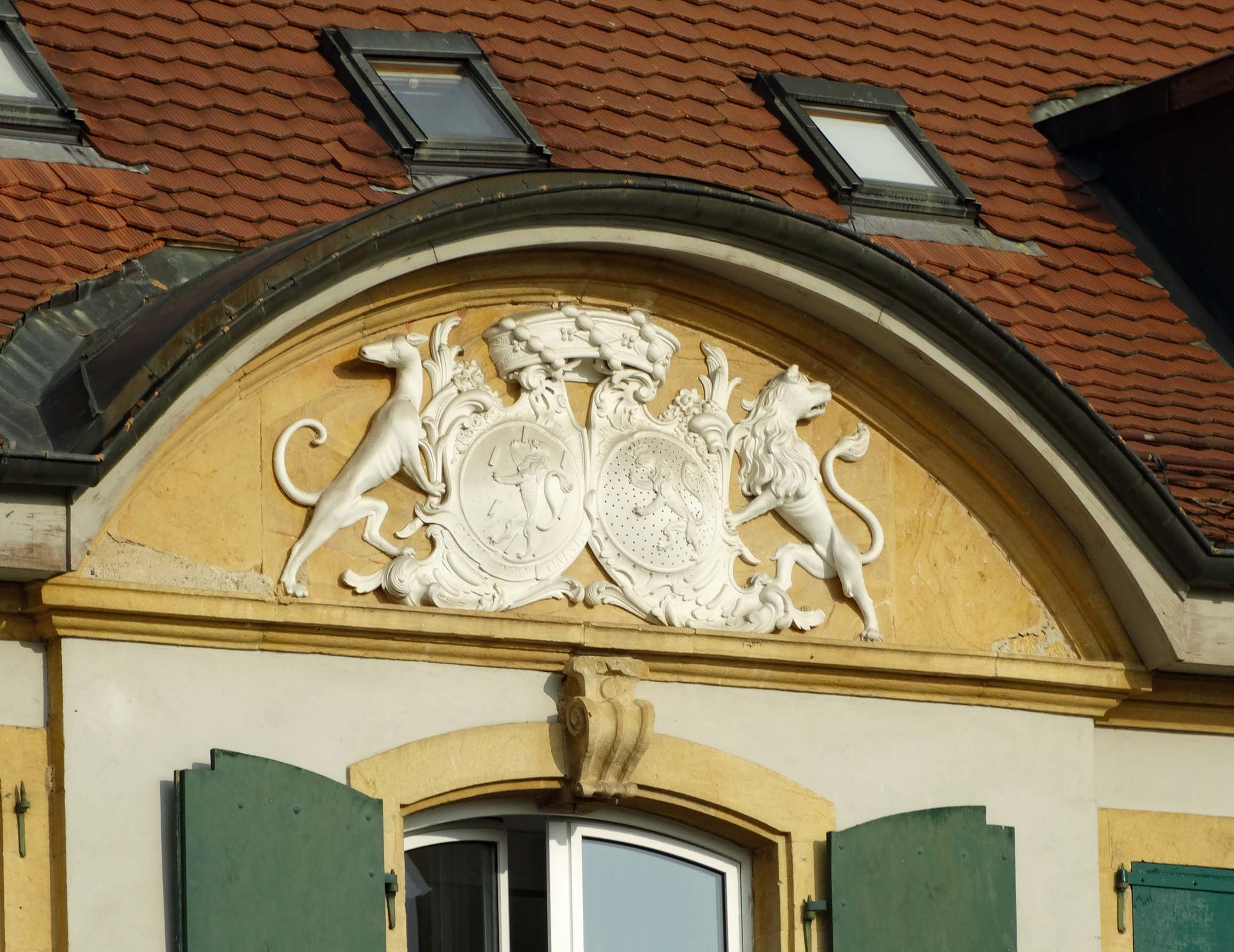 Château d'Orny (act. asile)